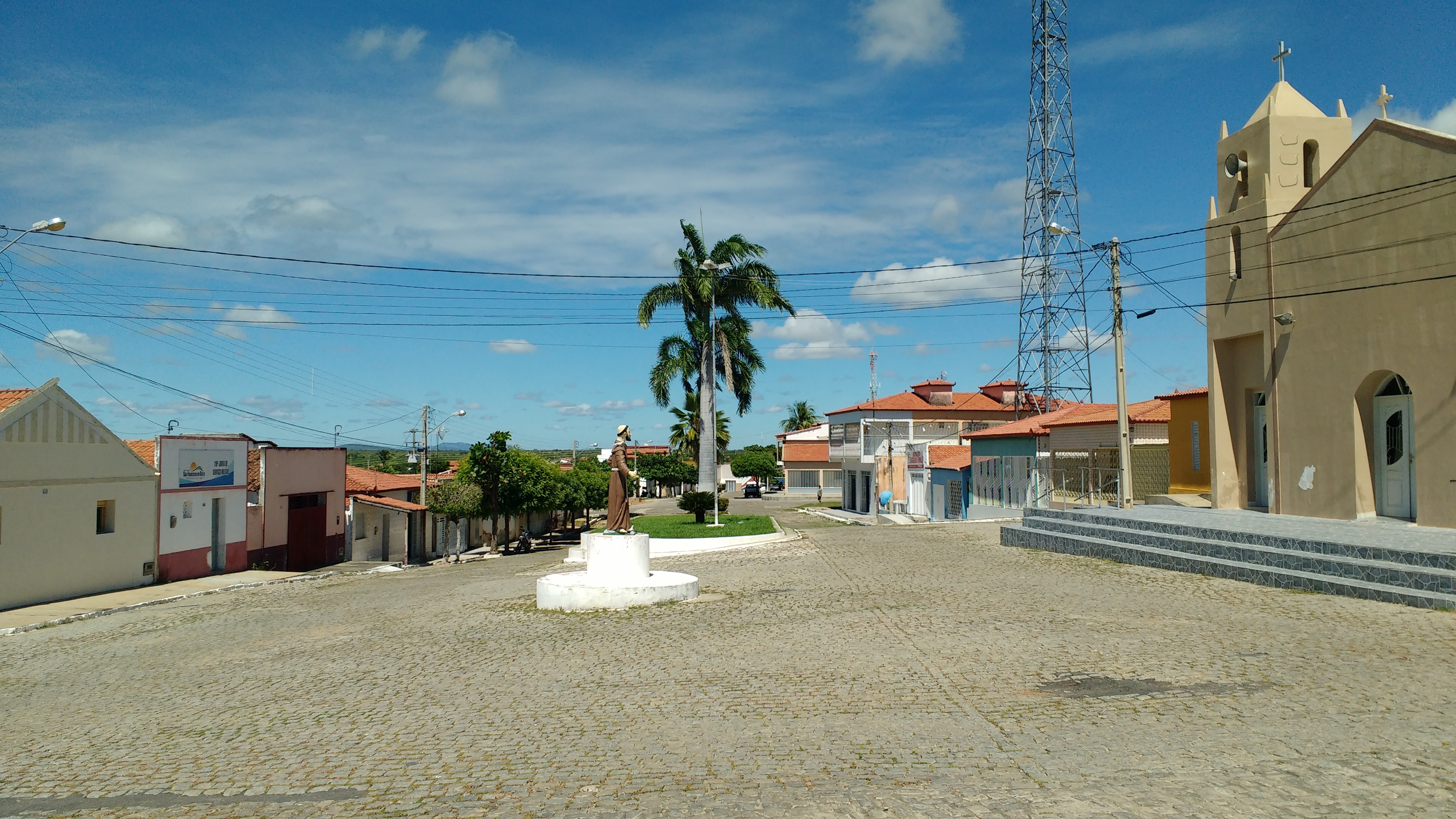 Rua São Francisco em São Francisco do Oeste, Rio Grande do Norte, (Brasil)